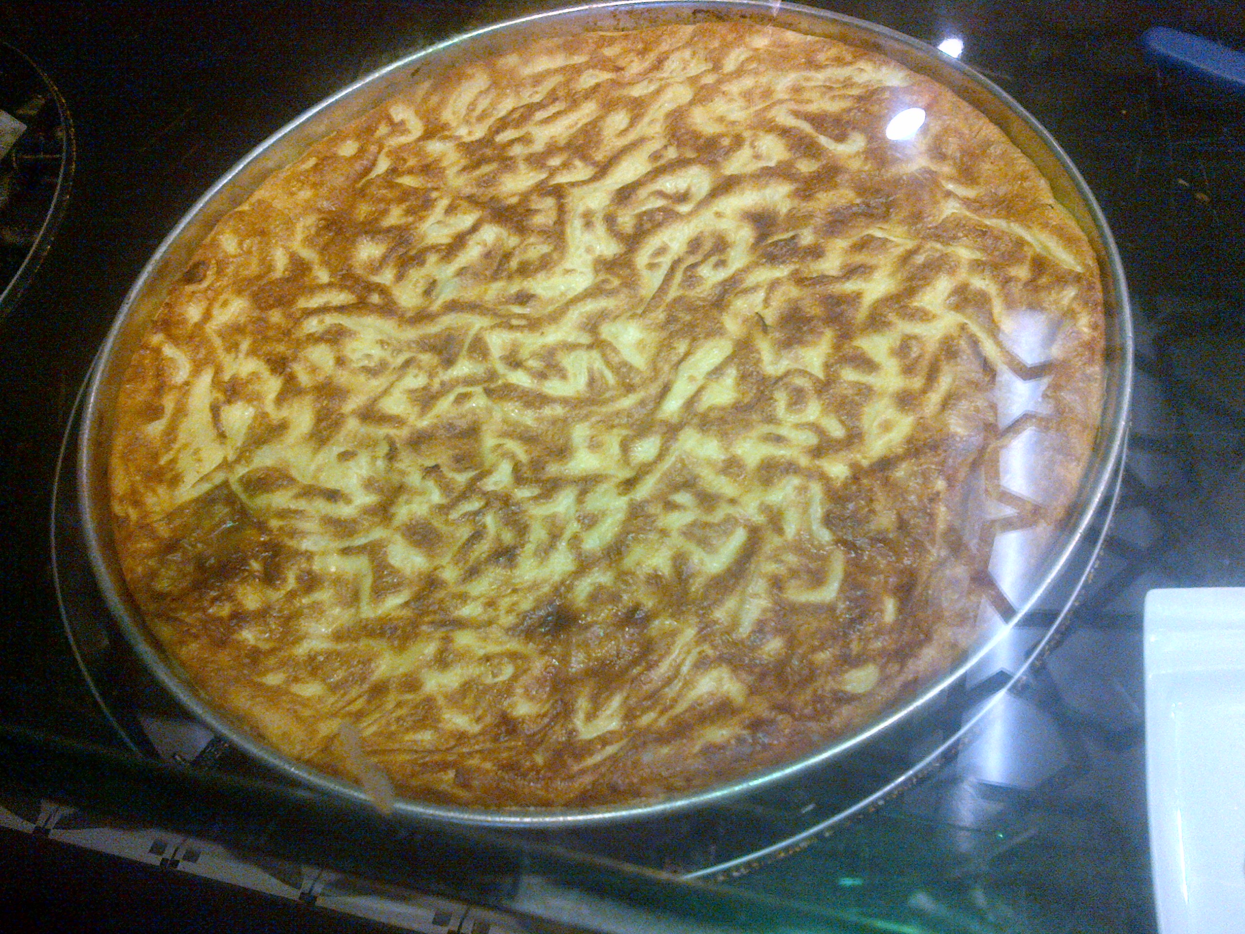 "Su böreği"